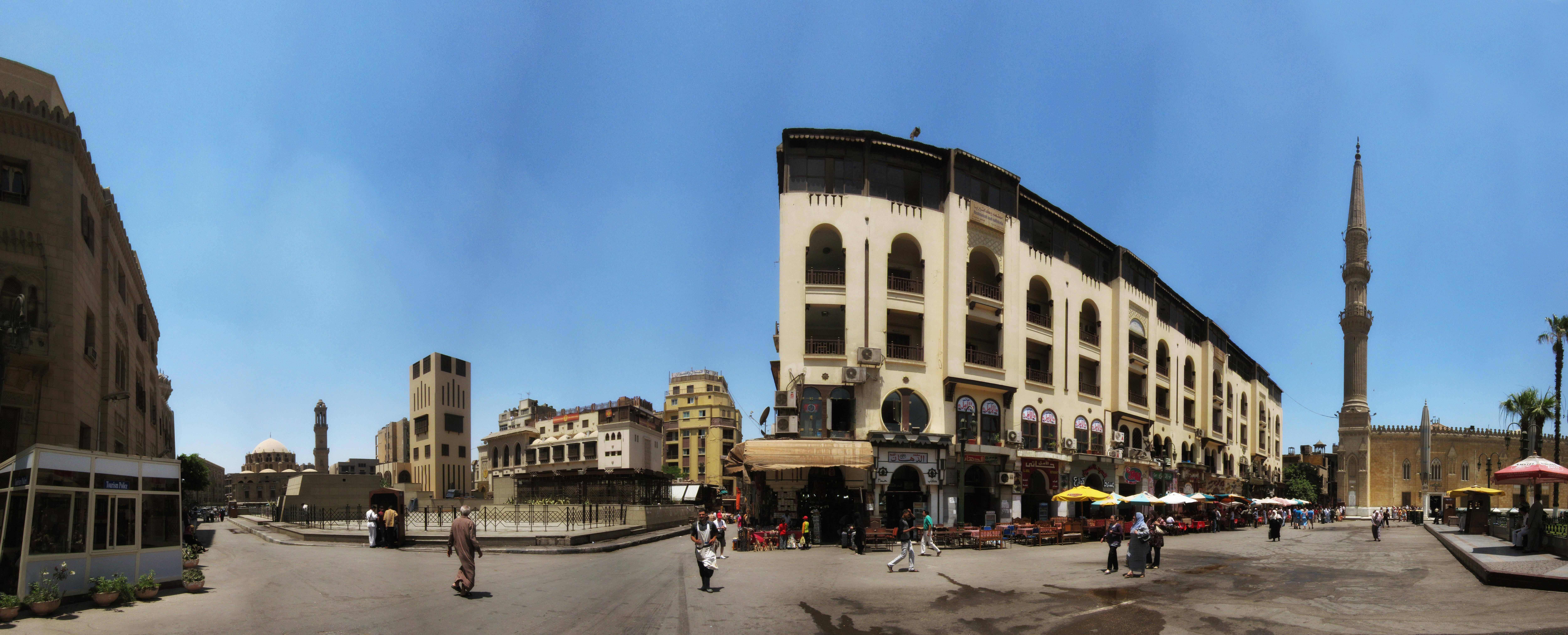 Masjid Al-Hussain bin Ali Plaza ميدان مسجد الحسين بن علي رضي الله عنه / Cairo / Egypt - 29 05 2010